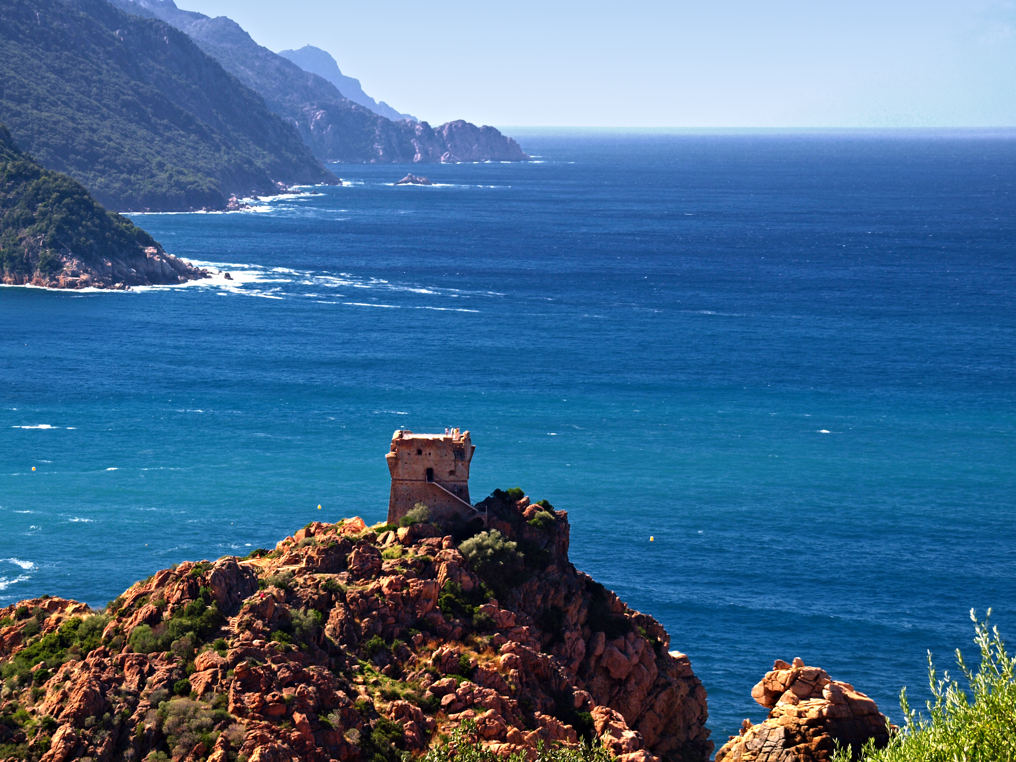 Ota (Corsica) - Littoral sud du golfe de Porto